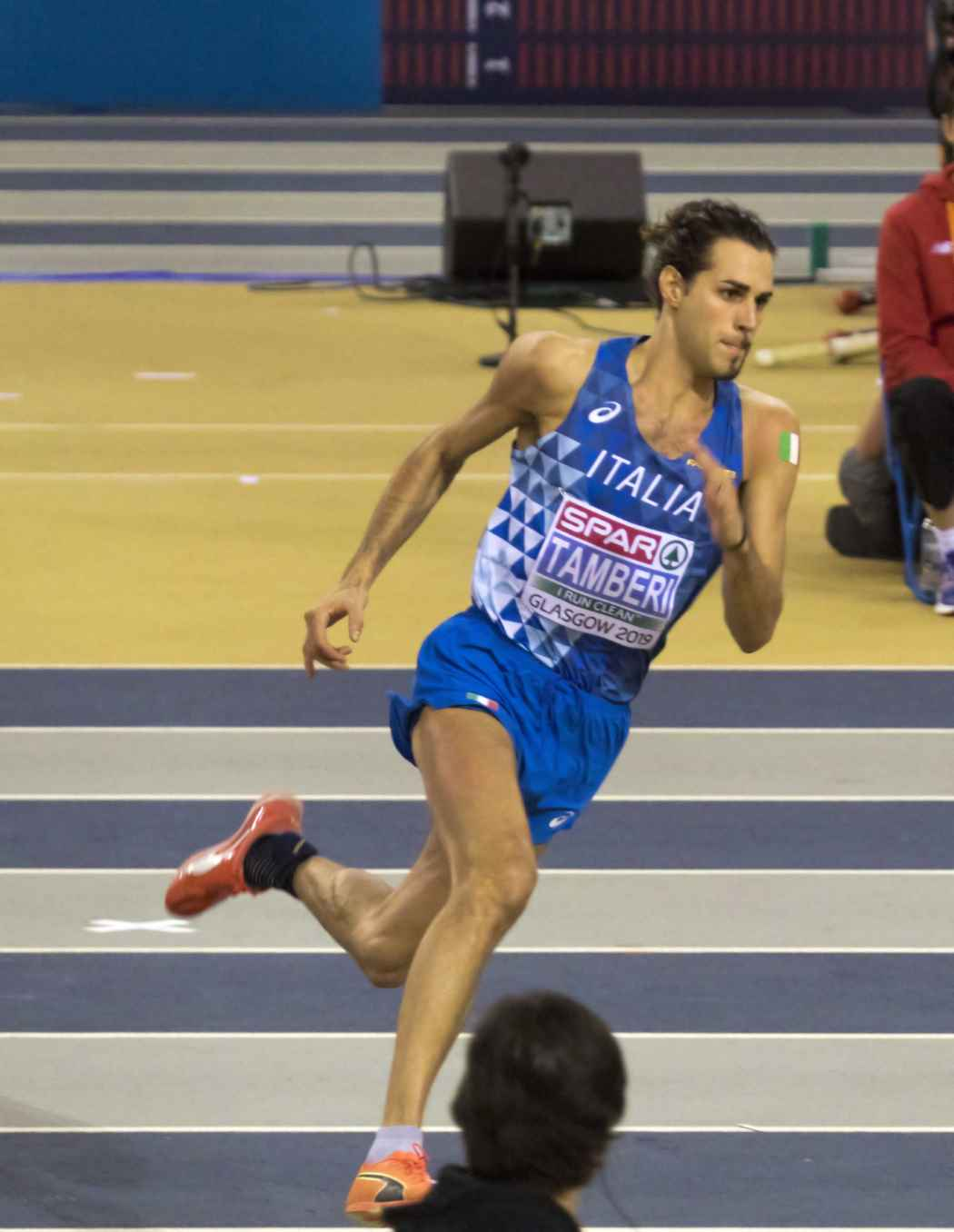 EKI20345 finale hoog tamberi